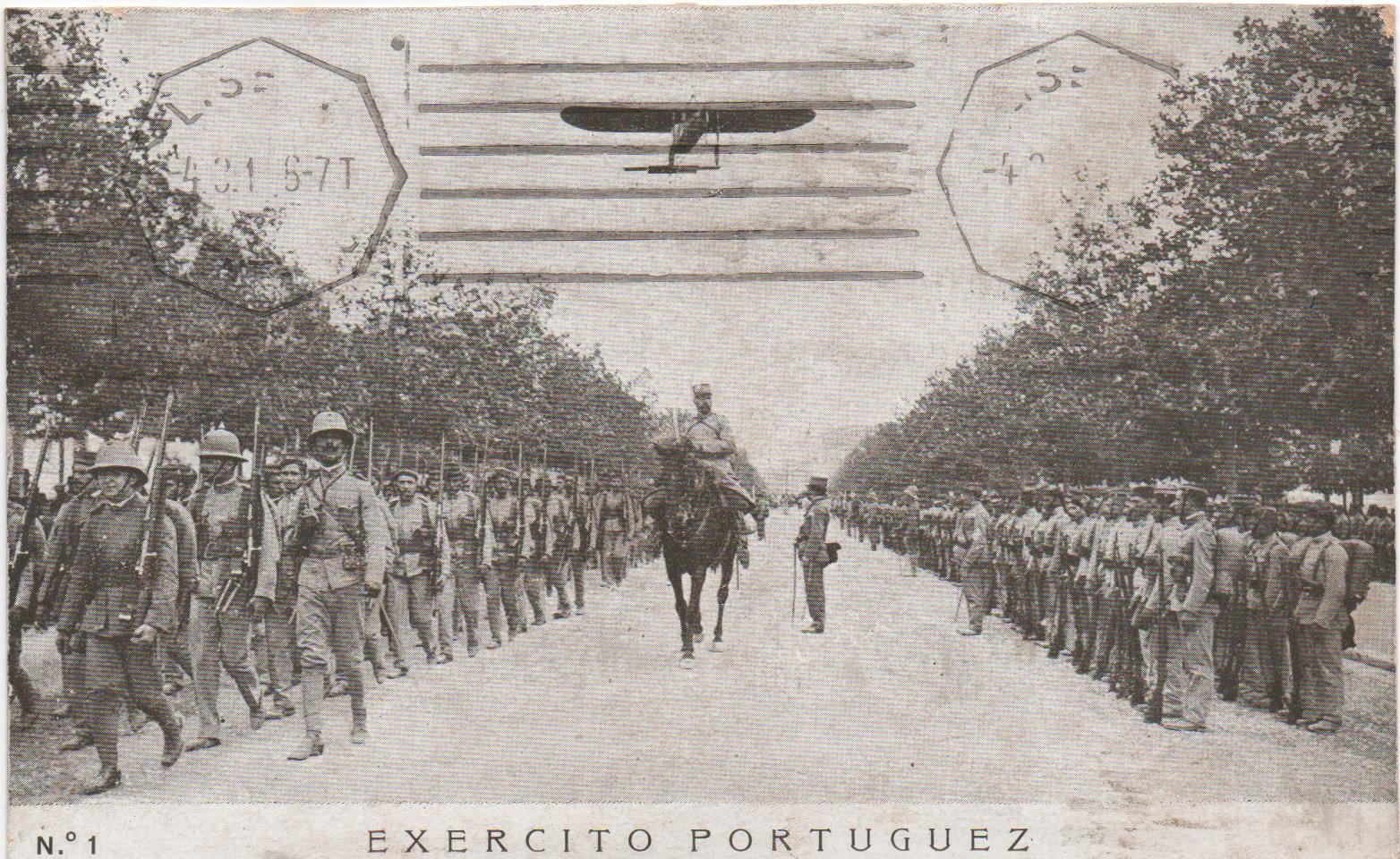 Passage d'un Deperdussin au dessus d'une fête à Lisbonne